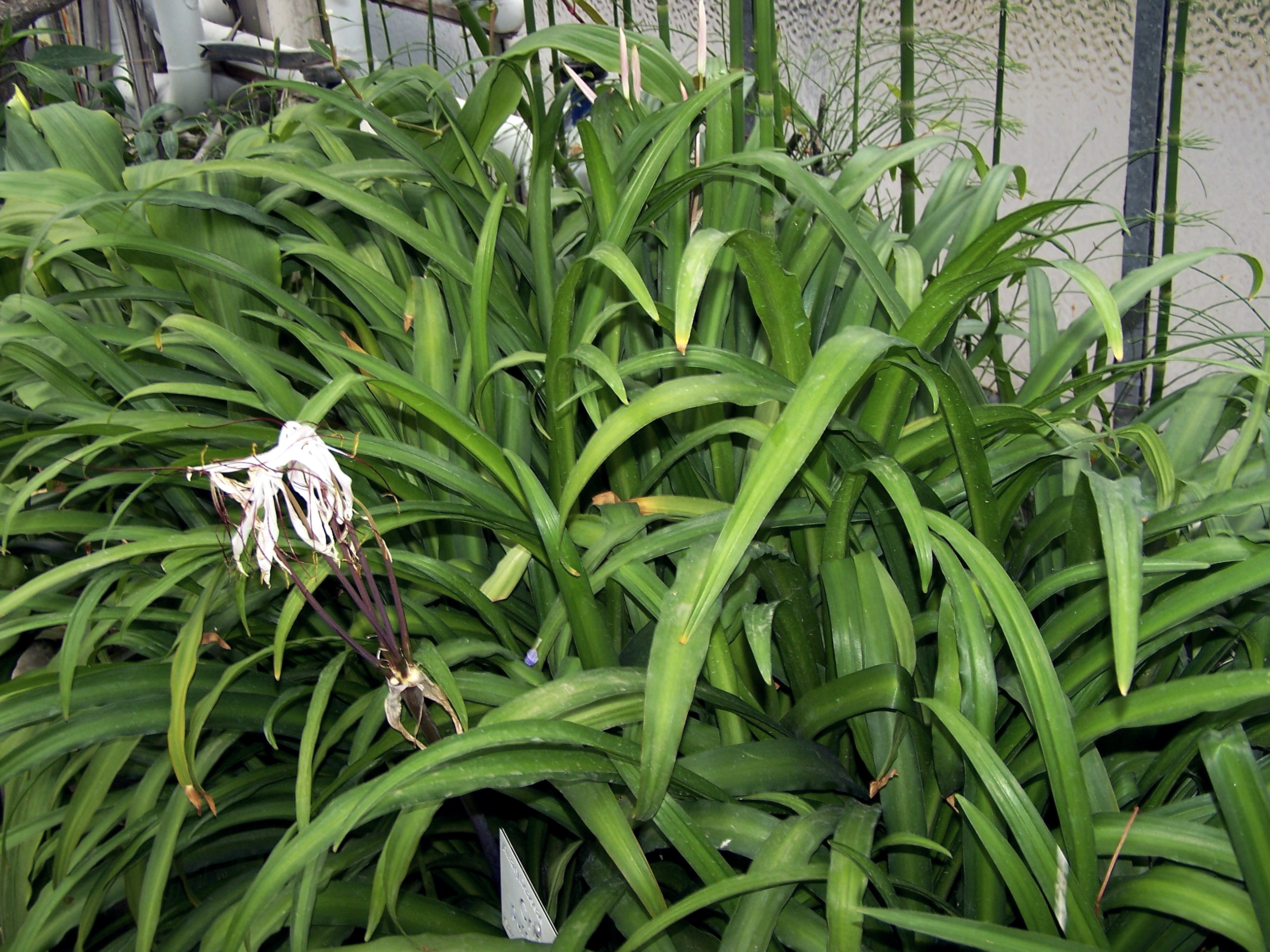 Crinum purpurascens 17 juin 2006 Vieux jardin botanique de Göttingen